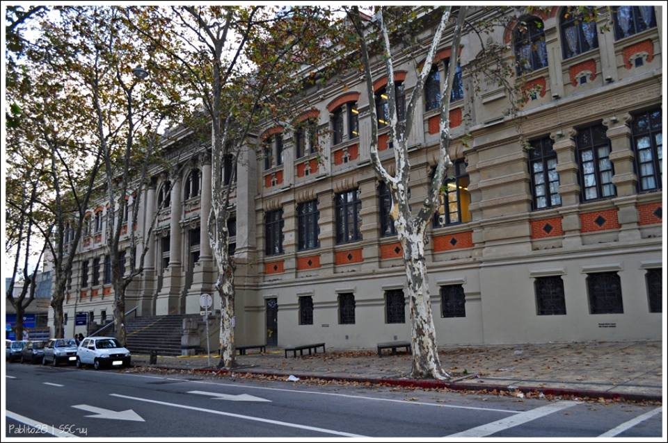 Fachada del Iava